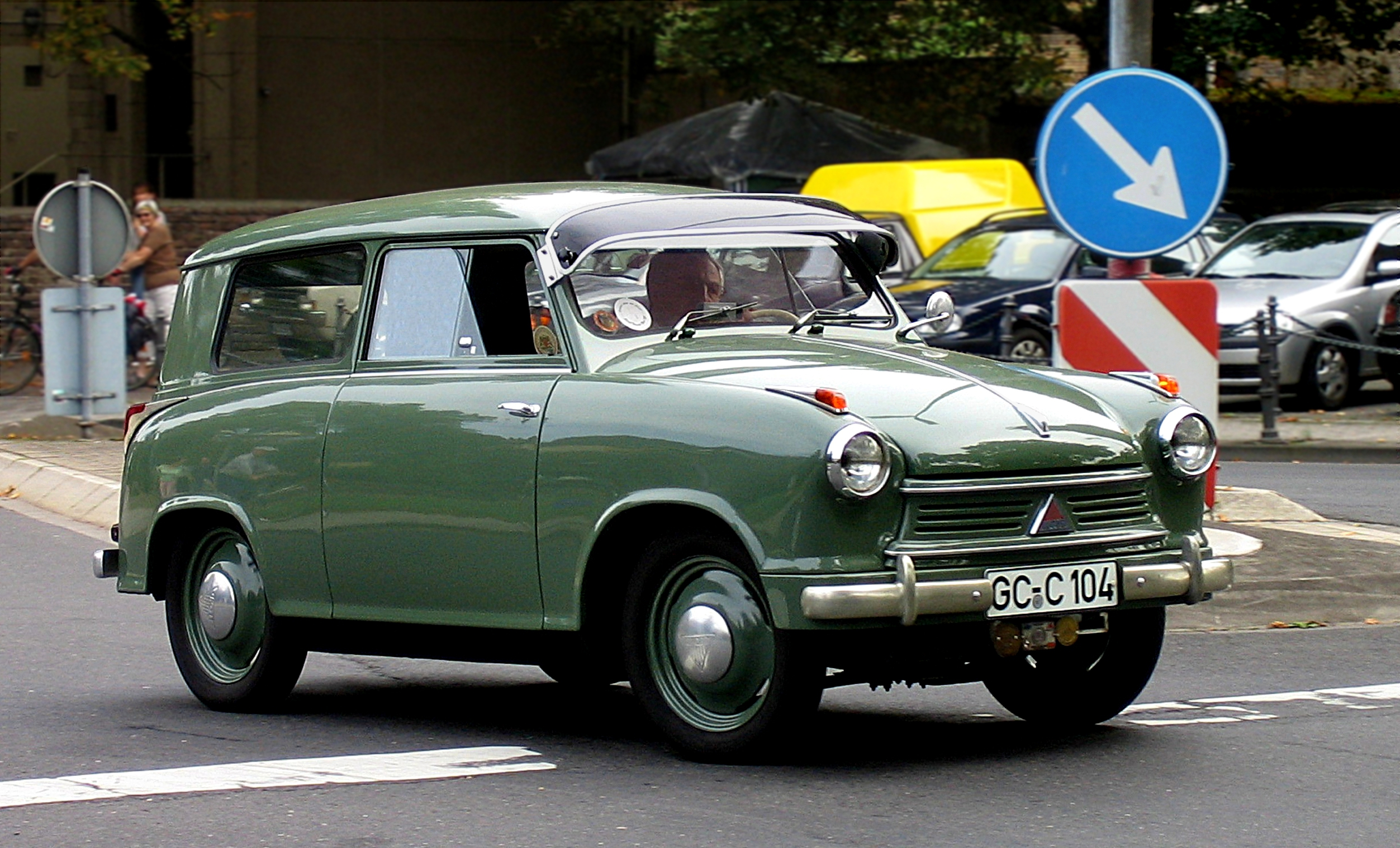 Lloyd LS 600, Baujahr 1956, beim Borgwardtreffen in Andernach